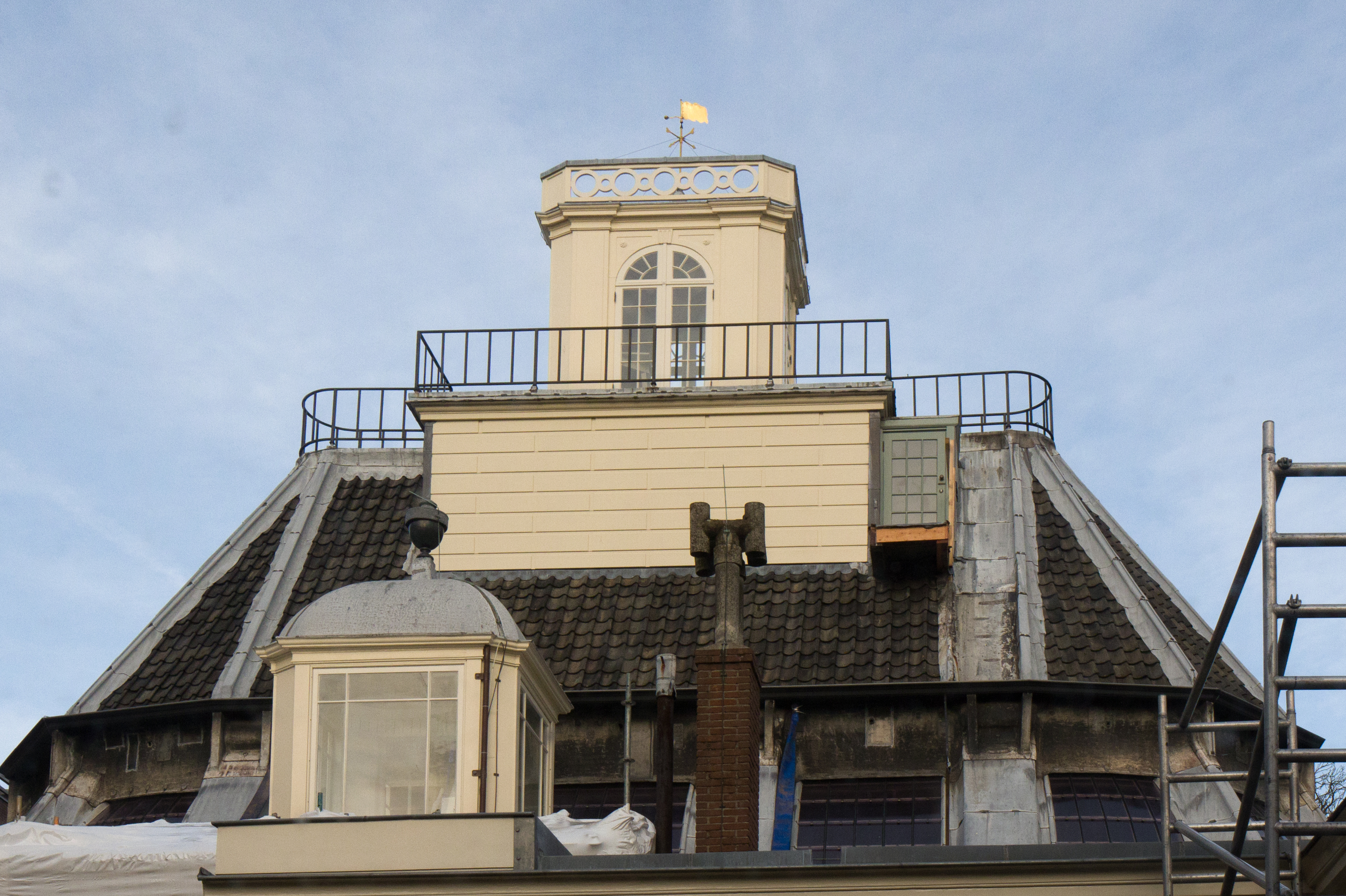 Teylers Museum: de sterrenwacht, gezien vanuit het fundatiehuis